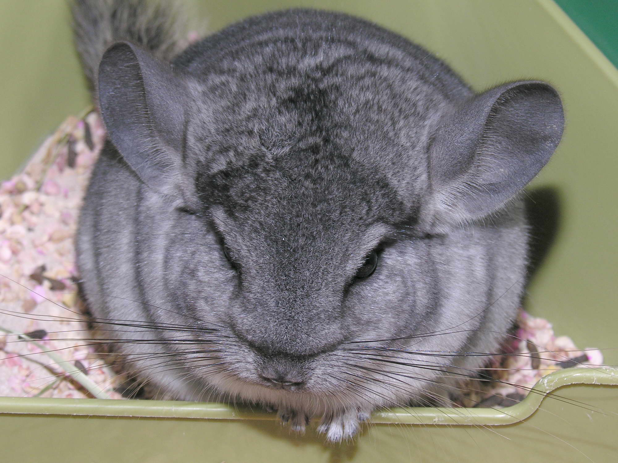 domestic chinchilla, chinchilla laniger x chinchilla brevicaudata Publish by Luis Miguel Bugallo Sánchez. Self made